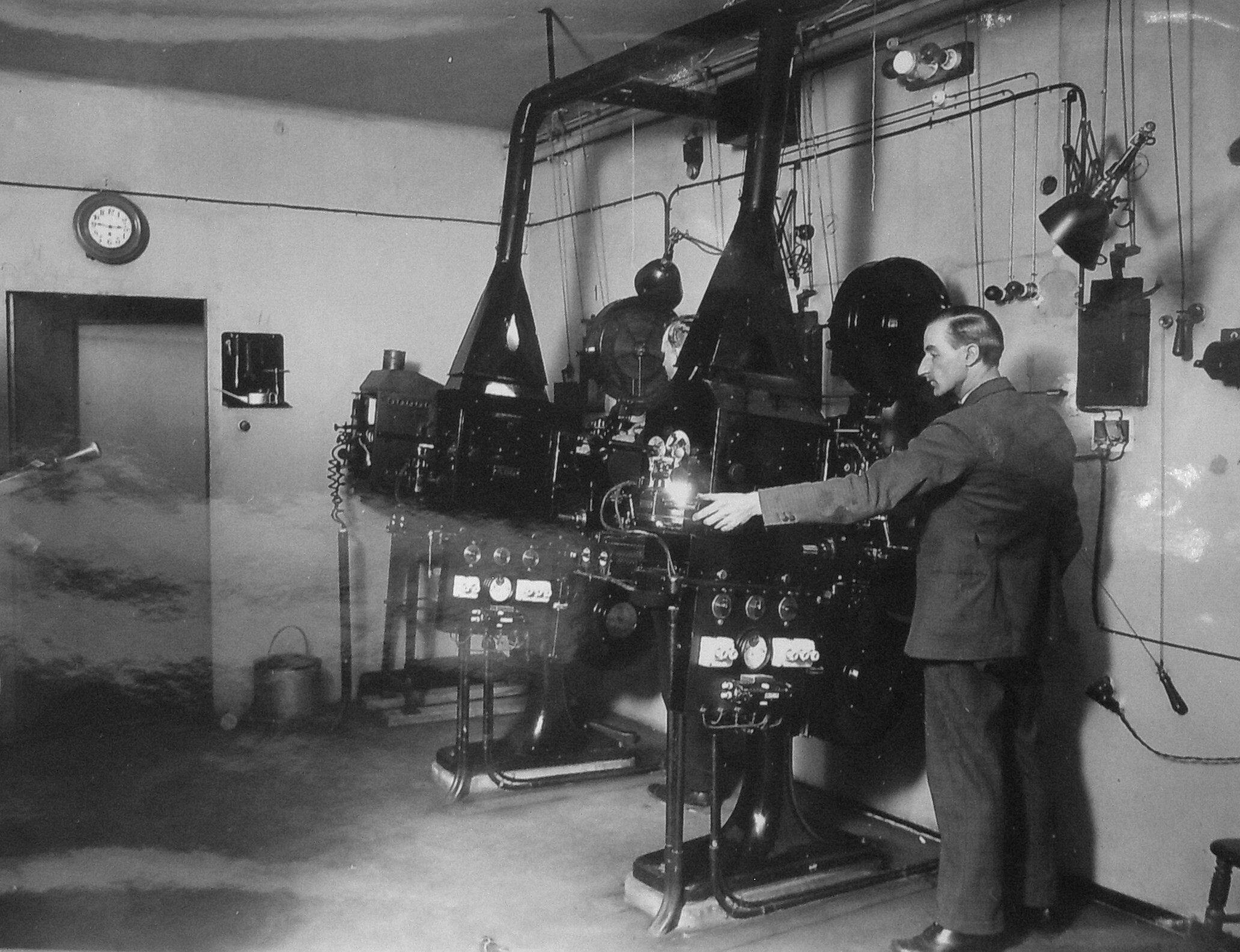 Skandiateaterns ursprungliga maskinrum med AEG, Triumphator - projektorer